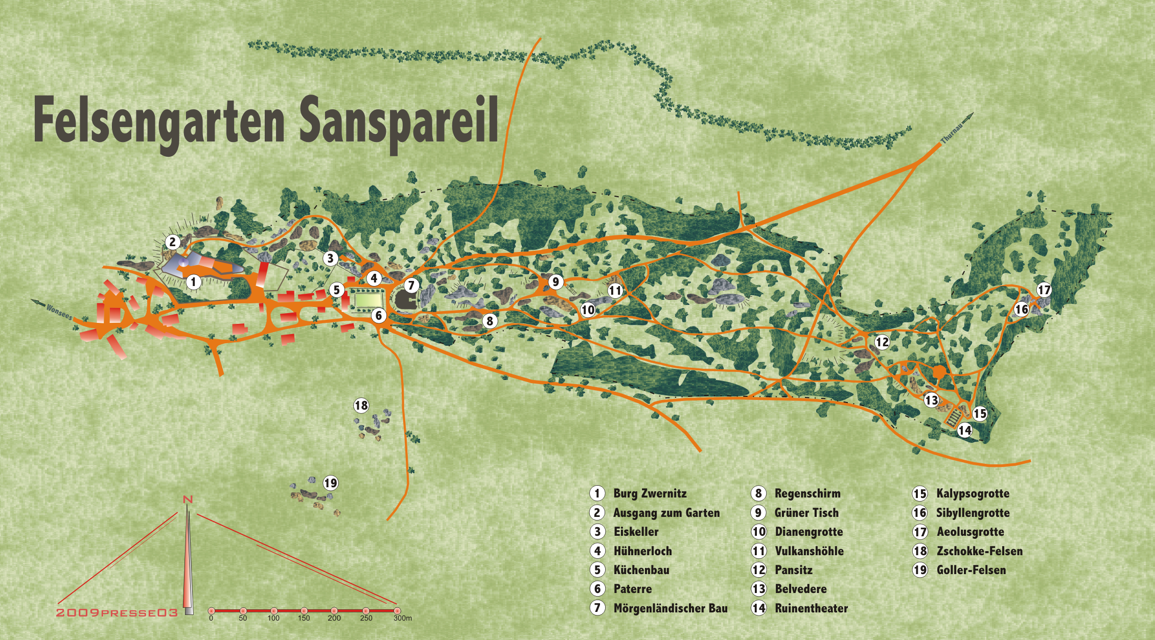 Lageplan Felsengarten Sanspareil, Gemeinde Wonsees, Franken, Bayern